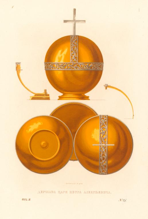 Держава царя Петра Алексеевича Эта держава поступила на сохранение в Оружейную палату в 1728 г. по указу императора Петра II от 30 марта на имя действительного статского советника, князя Василия Одоевского, по описи короновальных вещей его величества, заключающей в себе корону ценой 122 608 рублей, державу, шпагу, трость, кавалерскую звезду, епанчи, петлицы и пряжки. «Держава золотая, весом золота сто десять золотников; цена с серебром двести восемьдесят рублев». Над золотым яблоком ее серебряный гладкий крест; по яблоку серебряные прорезные обод и пояс. При ней имеется серебряная золоченая рукоять. В новейших описях эта держава ошибочно приписана царю Петру Алексеевичу. Древности Российского государства (Antiquities of Russian country), 1846—1853. Иллюстратор — Солнцев, Фёдор Григорьевич.